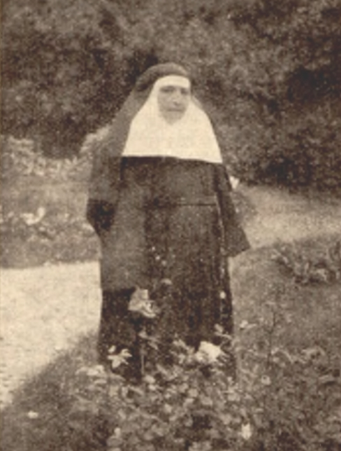 Matka Walentyna Lisiecka OSU (1846-1936) przełożona w klasztorach OSU Gniezno, Tarnów, Koszyce Małe. Źródło: Krystyna Korewicka, Artykuł .Ś.p. Matka Walentyna Lisiecka O.S.U., „Dziś i jutro. Pismo dla młodzieży” (nr 8), Kraków , kwiecień 1936, Wydawca: Zofia Zakrzewska. Brak zastrzeżeń prawa autorskiego.